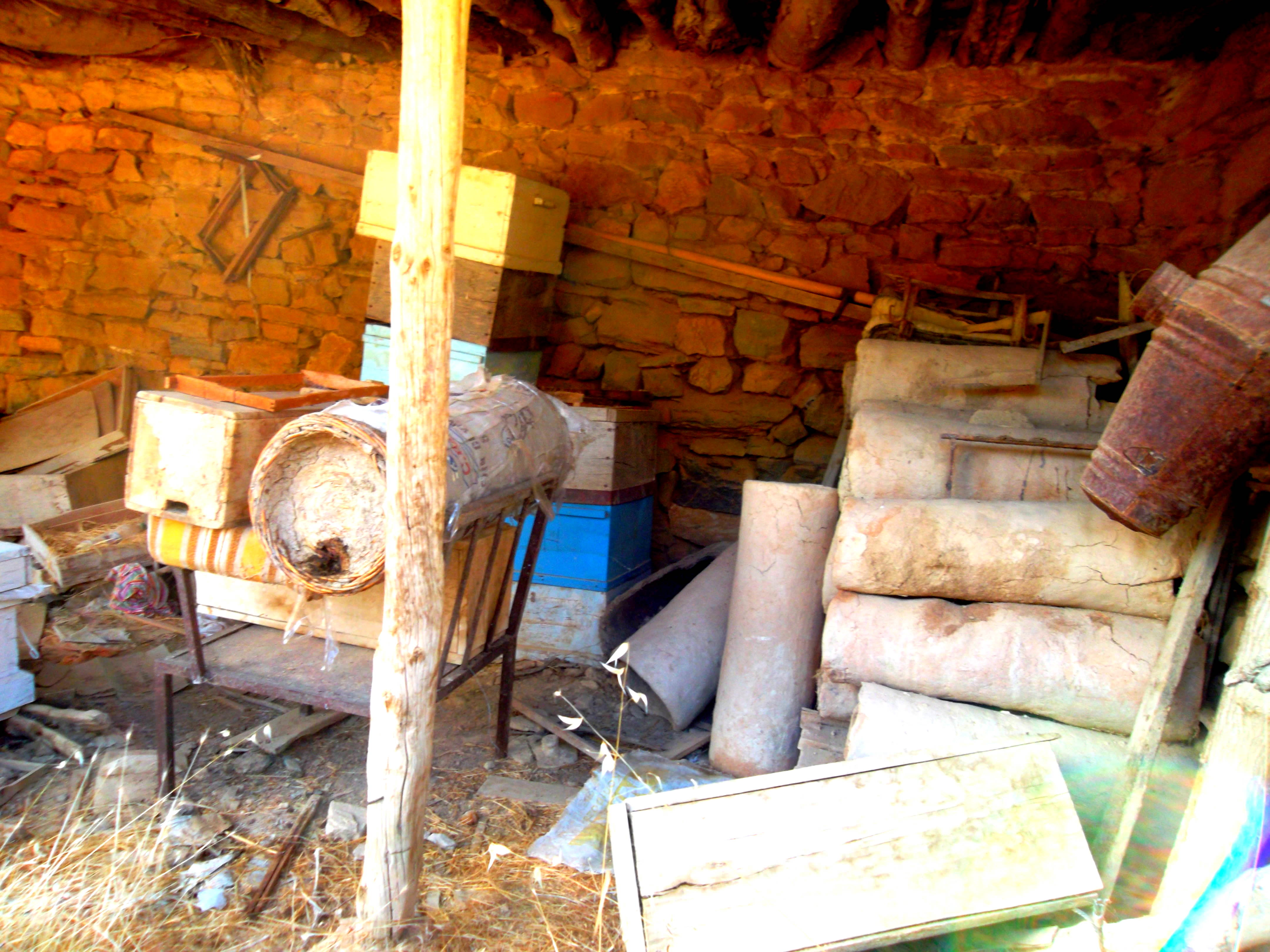 Karakovan